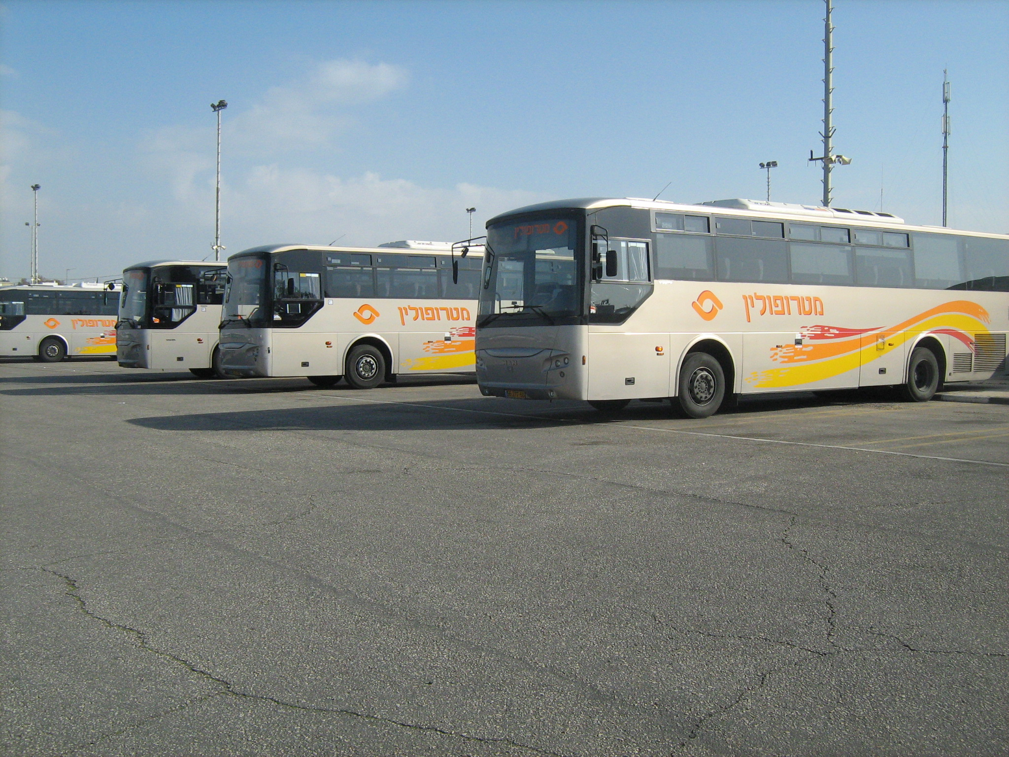 אוטובוסים של חברת מטרופולין בחניון אגד בחולון